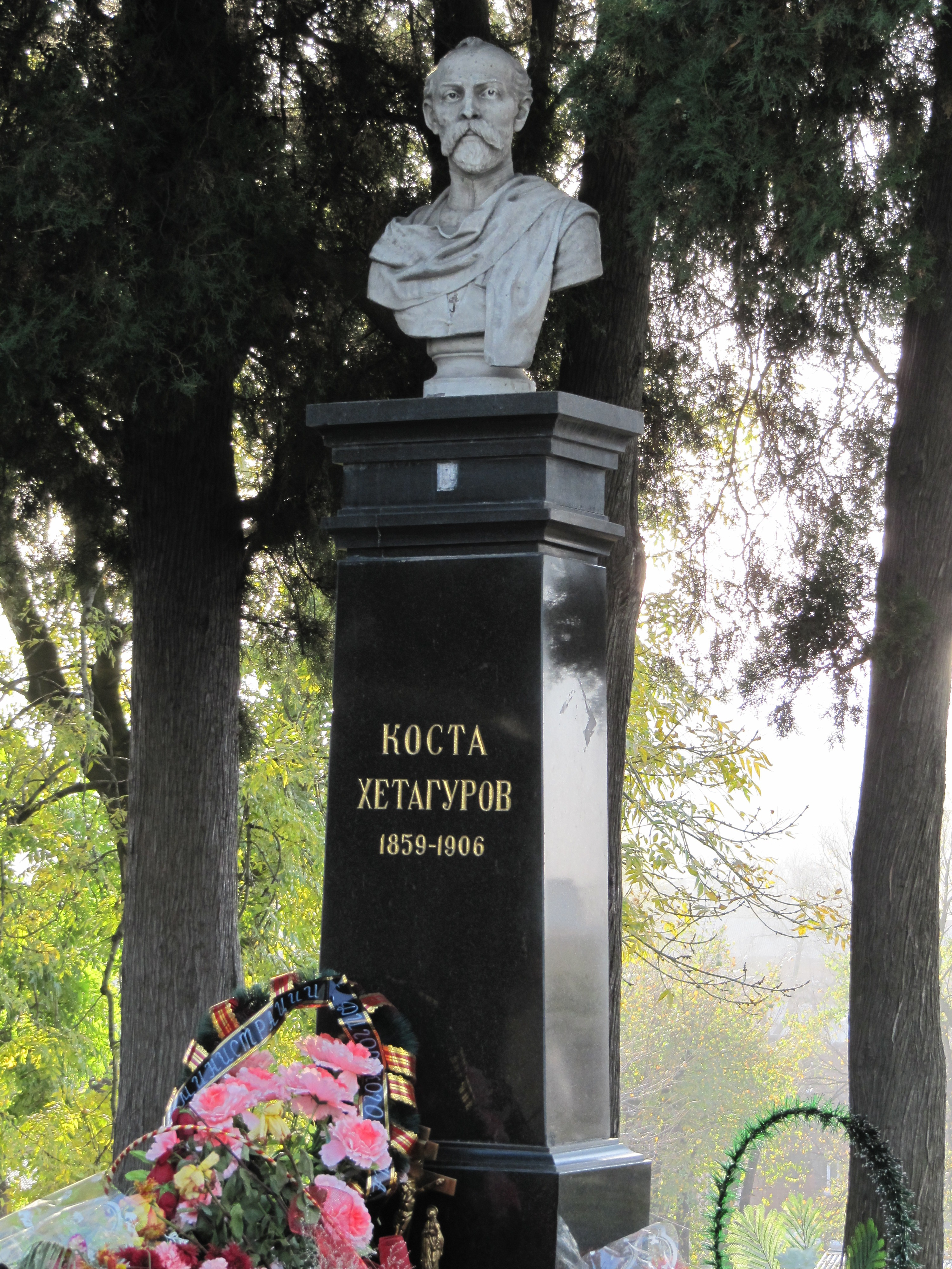 Памятник осетинскому поэту Косте Хетагурову на его могиле возле осетинской церкви во Владикавказе, Северная Осетия